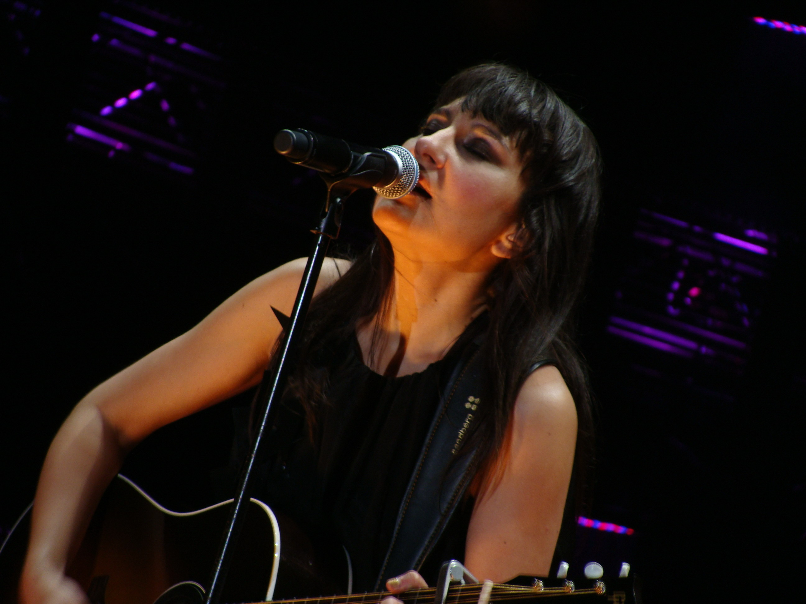 Eva Amaral